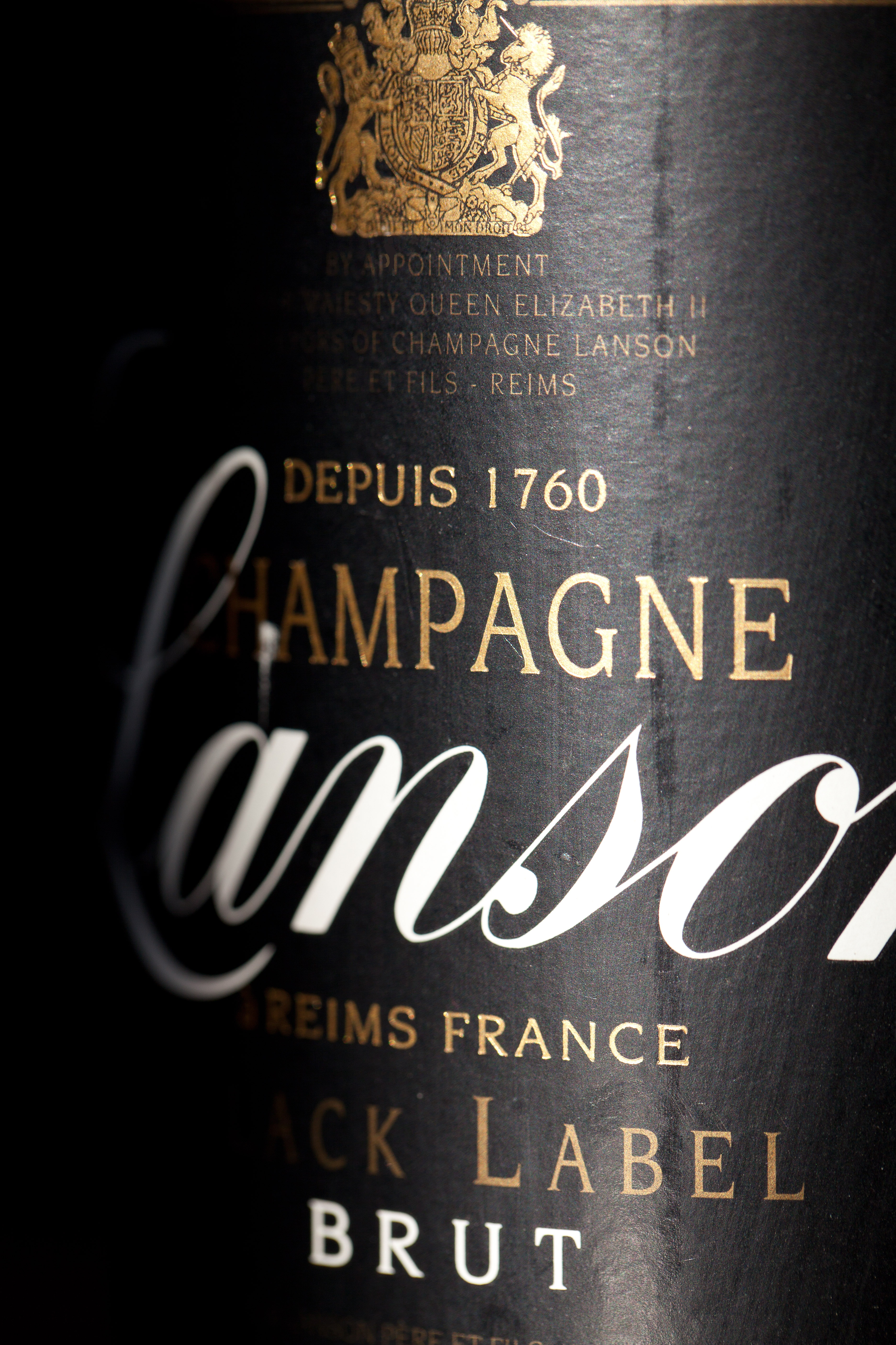 Etikett Champagne Lanson Black Label